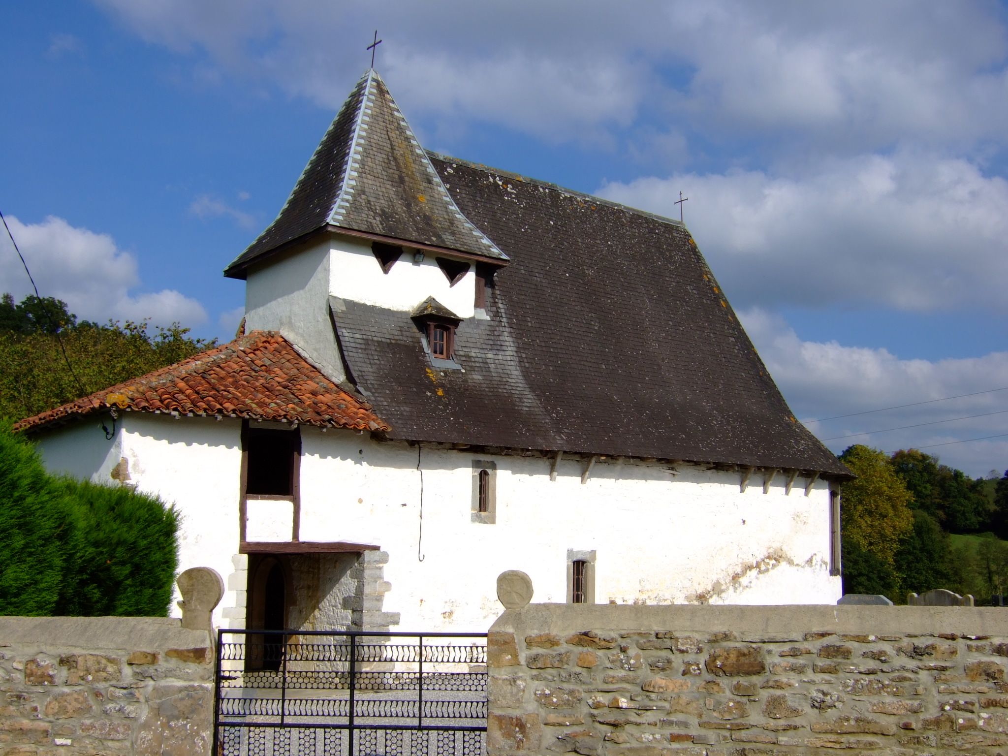 La chapelle d'Olhaïby